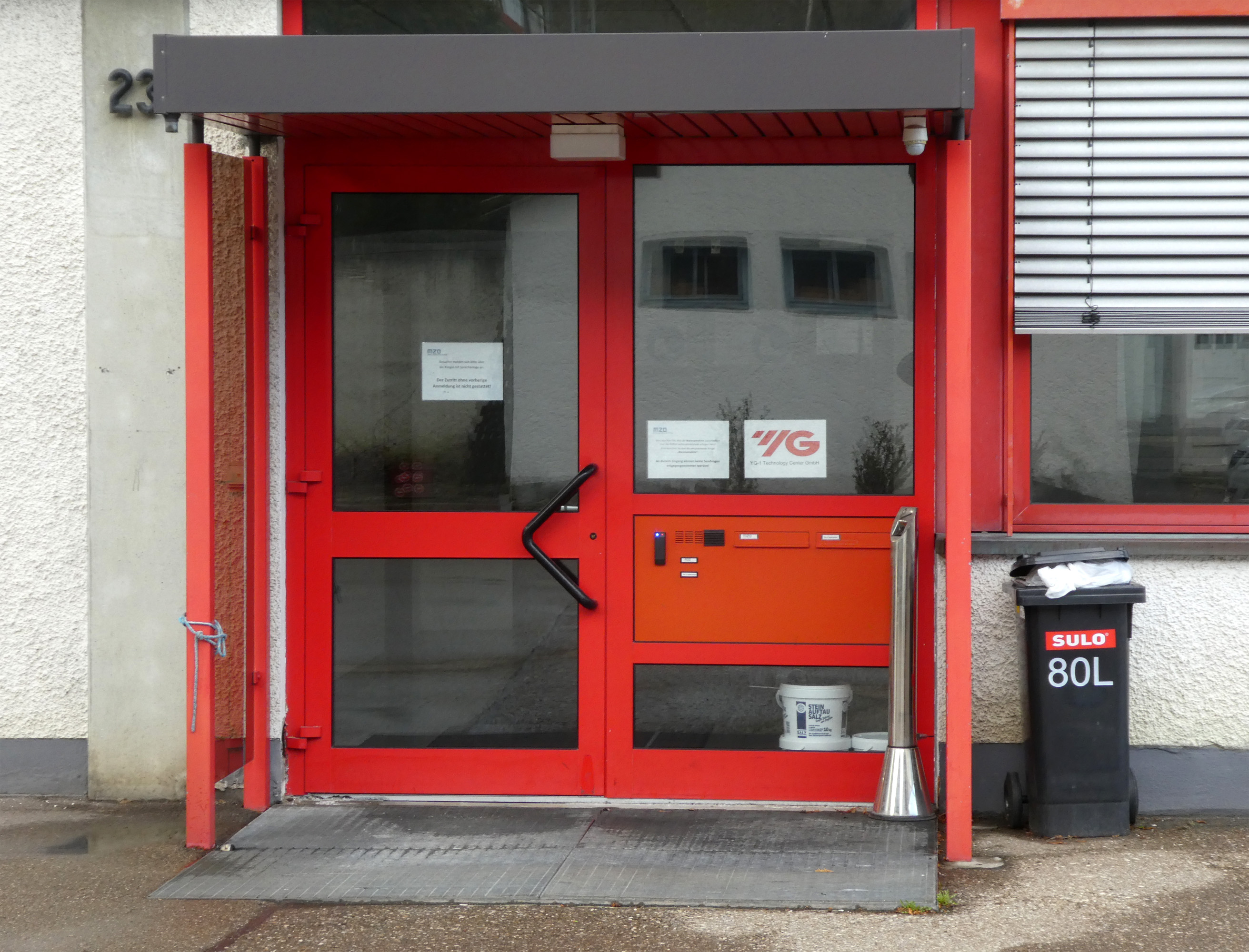 Oberkochen - YG-1 Technology Center GmbH im Kapellenweg 23/1